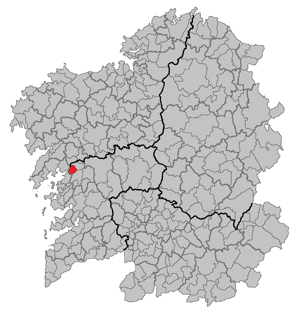 Mapa coa localización do concello de Catoira.